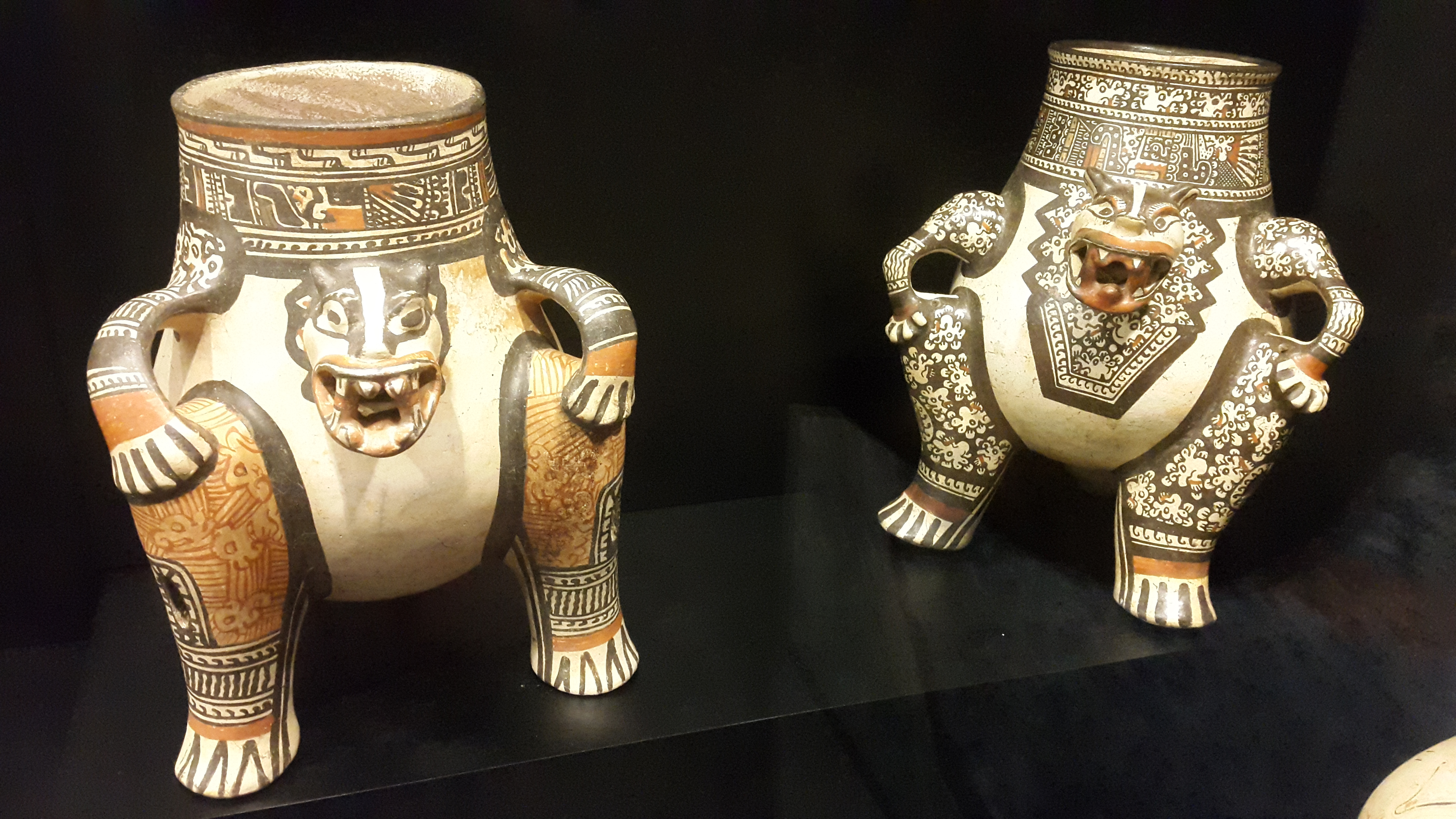 Jarrones trípodes de cerámica estilo Pataky, que representan al jaguar, con motivos y decorados mesoamericanos. Cultura de Nicoya. Museo del Jade. San José de Costa Rica.